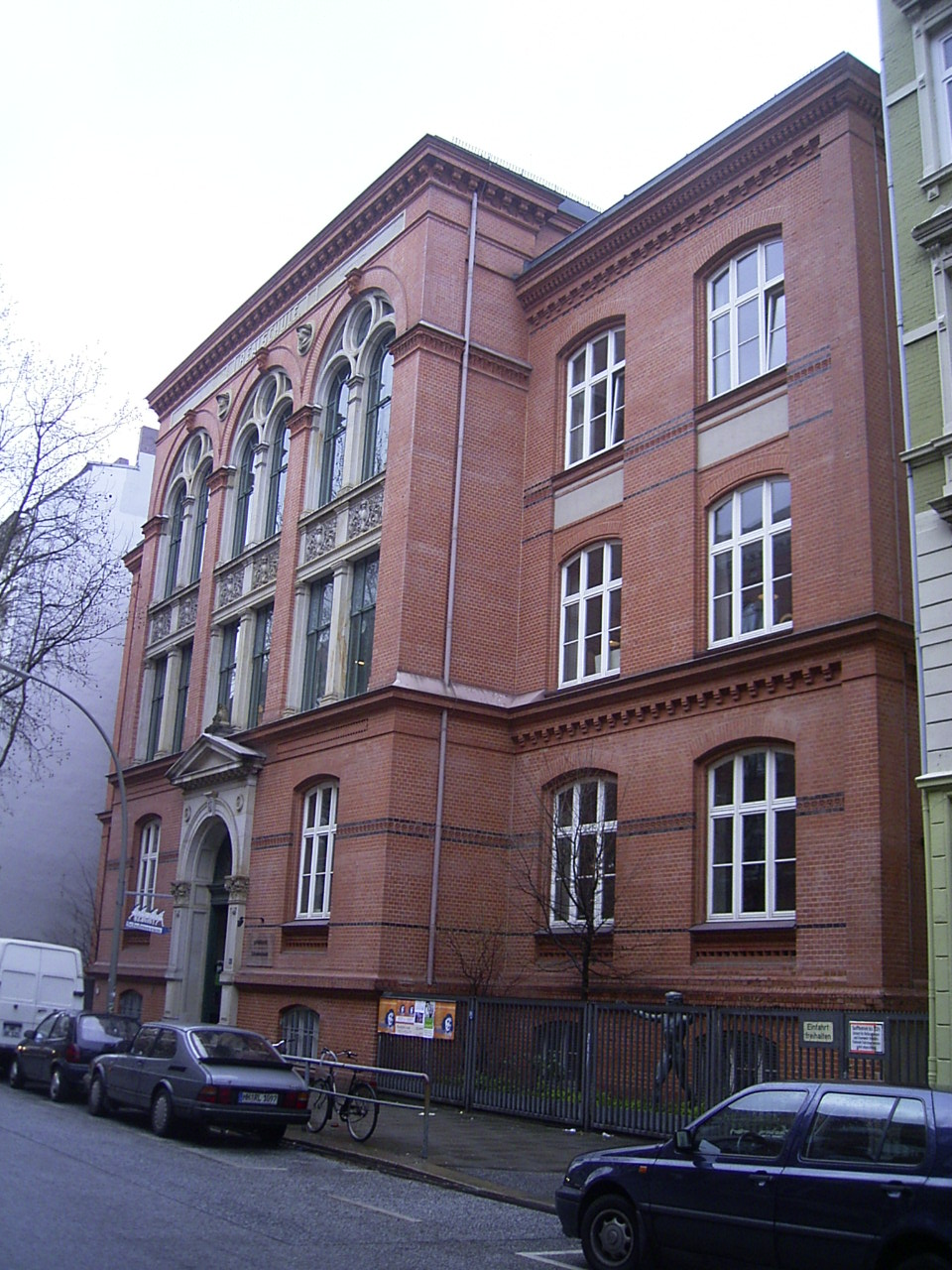 In einem ehemaligen Schulgebäude in der Seilerstraße in St. Pauli ist heute das Hamburger Schulmuseum untergebracht. Das Gebäude wurde 1885/86 von Eduard Hallier und Hinrich Fittschen als Realschule der evangelisch-reformierten Kirche errichtet.